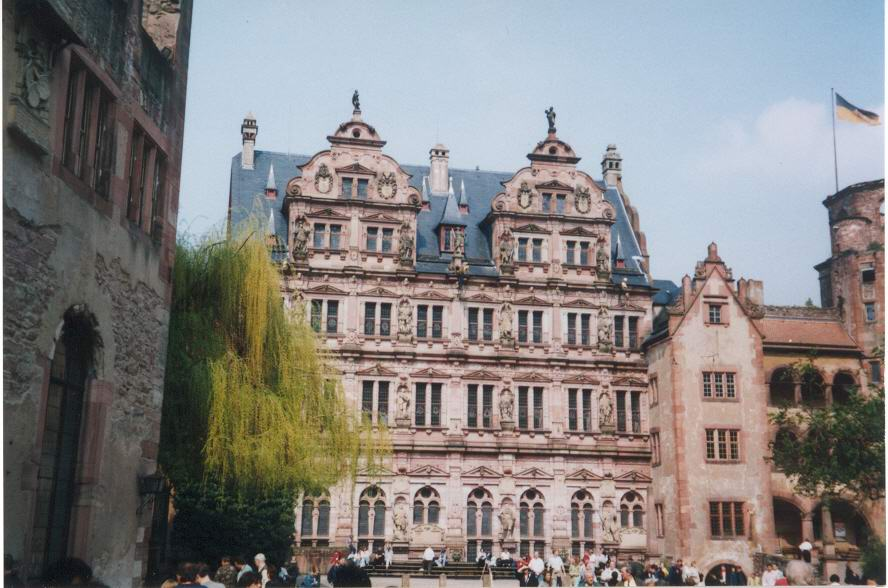 Замок в Гайдельберзі. Вид з внутрішнього подвір'я.